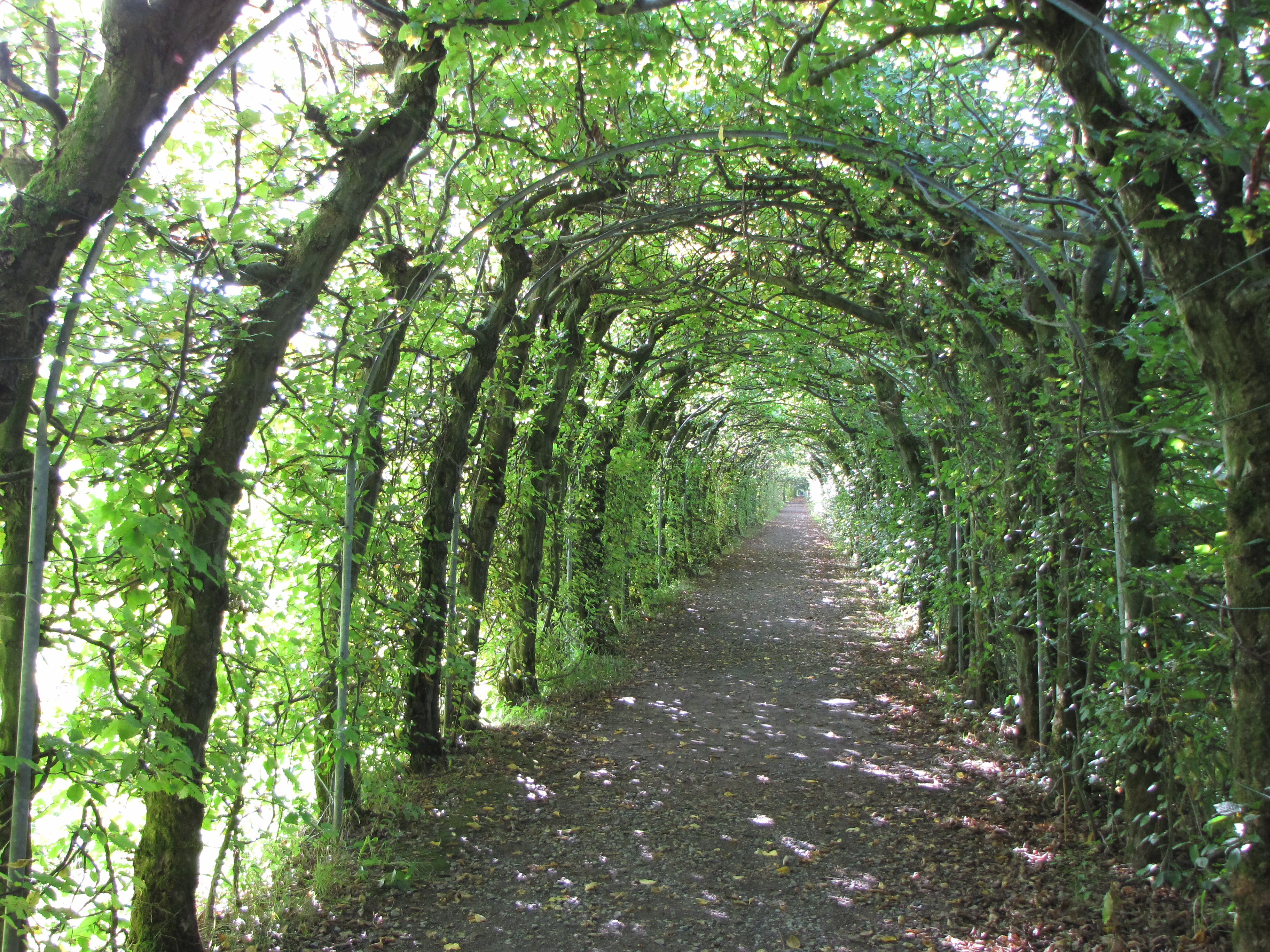 Plantée en 1885 et longue de 573 m, elle est l’une des plus longues d’Europe. Elle fut restaurée par les élèves du Centre provincial d’Enseignement agronomique de La Reid sur le site duquel elle se situe.